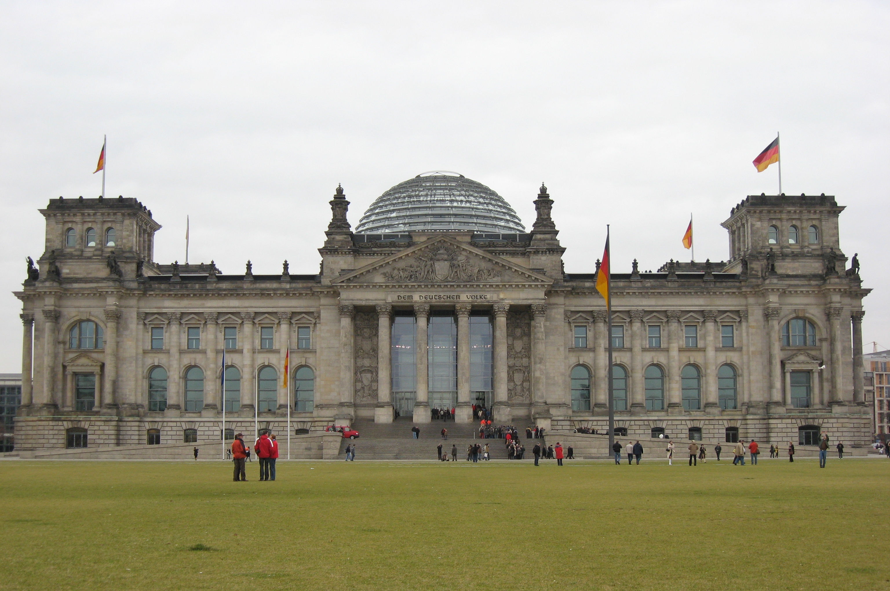 Bild vom Reichstag in Berlin